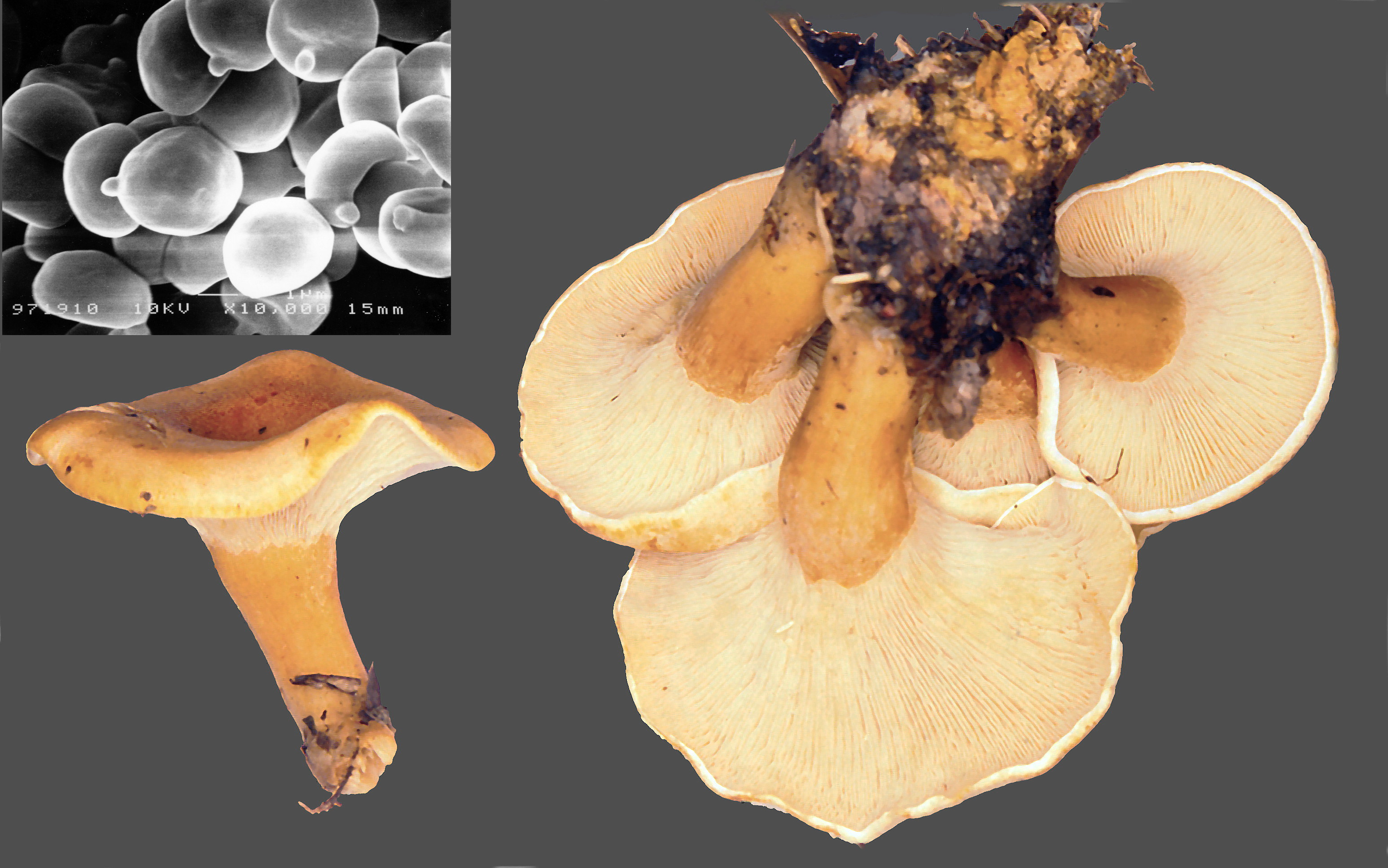 Nagaoka (Niigata, Japon), dans une plantation de bambous (Phyllostachys bambusoides), mêlée d'Acer palmatum, Cryptomeria japonica et Zelkova serrata, alt. 100 m, 2 novembre 1999, herb. D. Guez 99-11-02-1, 2 spécimens in herb. P.-A. Moreau